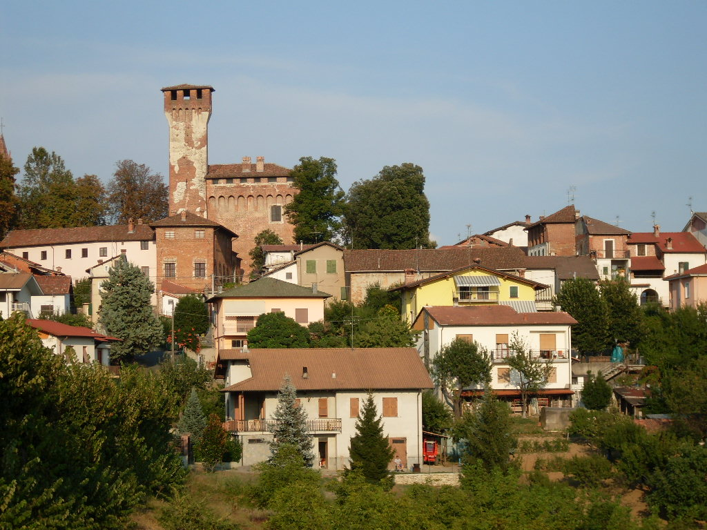 San Cristoforo (AL)